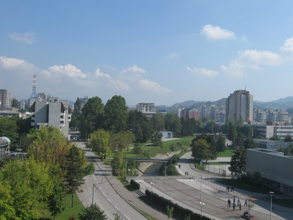 Tuzla